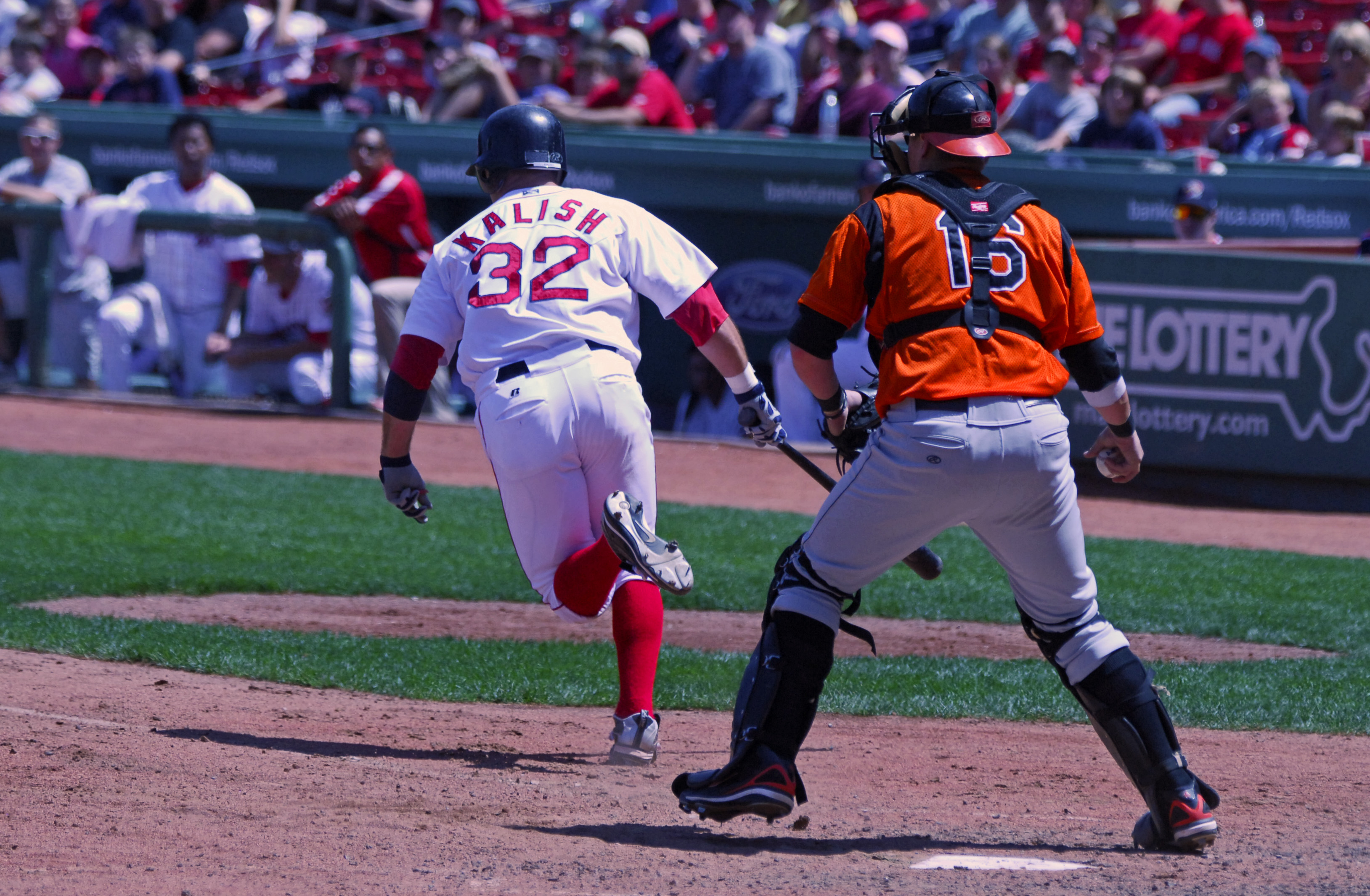 dropped strikeout